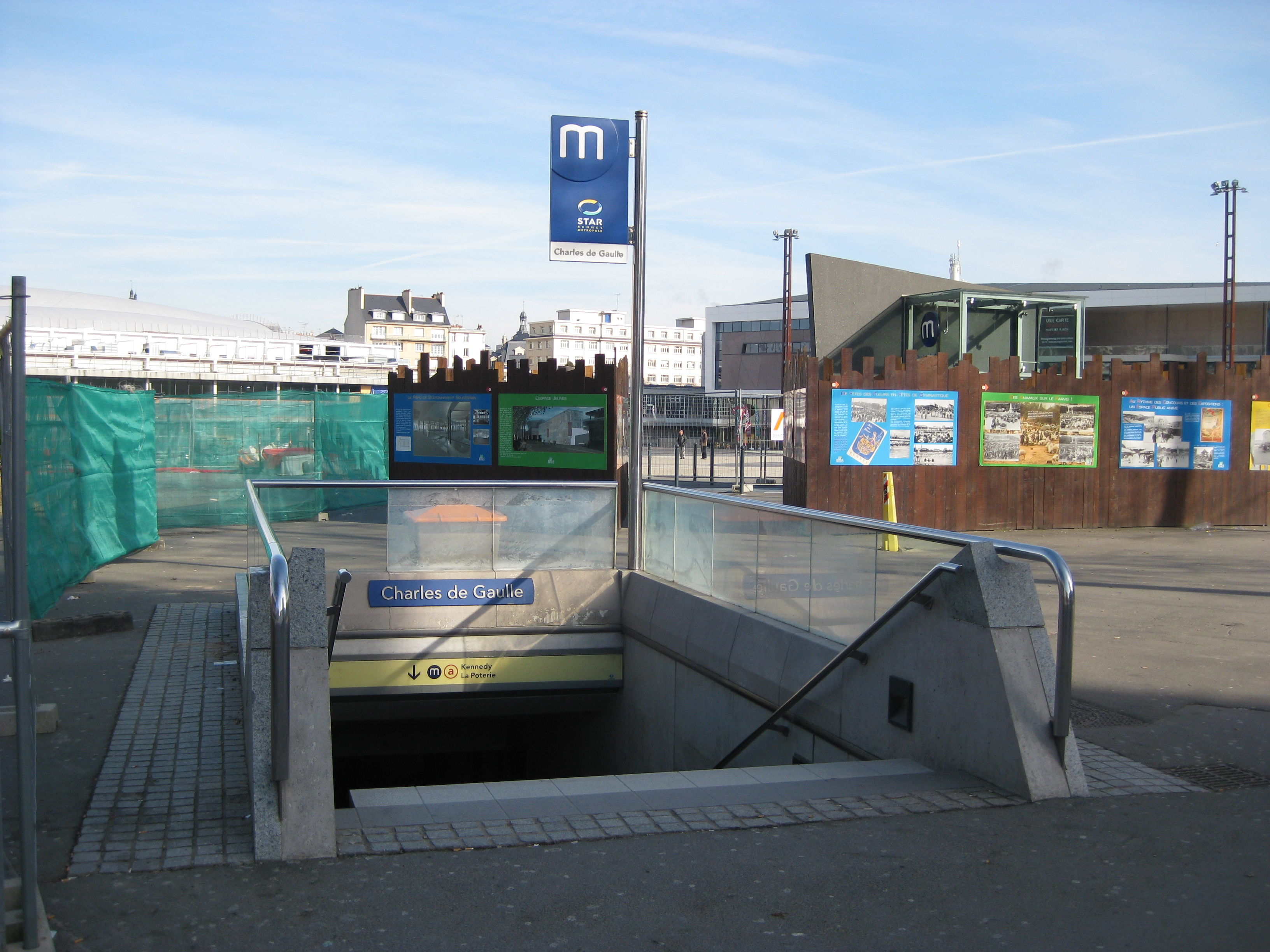 Accès sud Métro Charles de Gaulle à Rennes